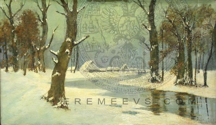 Ф. Р. Пархоменка. Зіма Палатно, алей. 60х105. Подпіс справа знізу